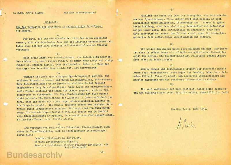 Auszug aus den "12 Gebote[n] für das Verhalten der Deutschen im Osten und die Behandlung der Russen", verfasst von Staatssekretär Herbert Backe als Ergänzung zu seinen Richtlinien und Weisungen für die Landwirtschaftsführer der Wirtschaftsorganisation Ost vom 23. Mai 1941